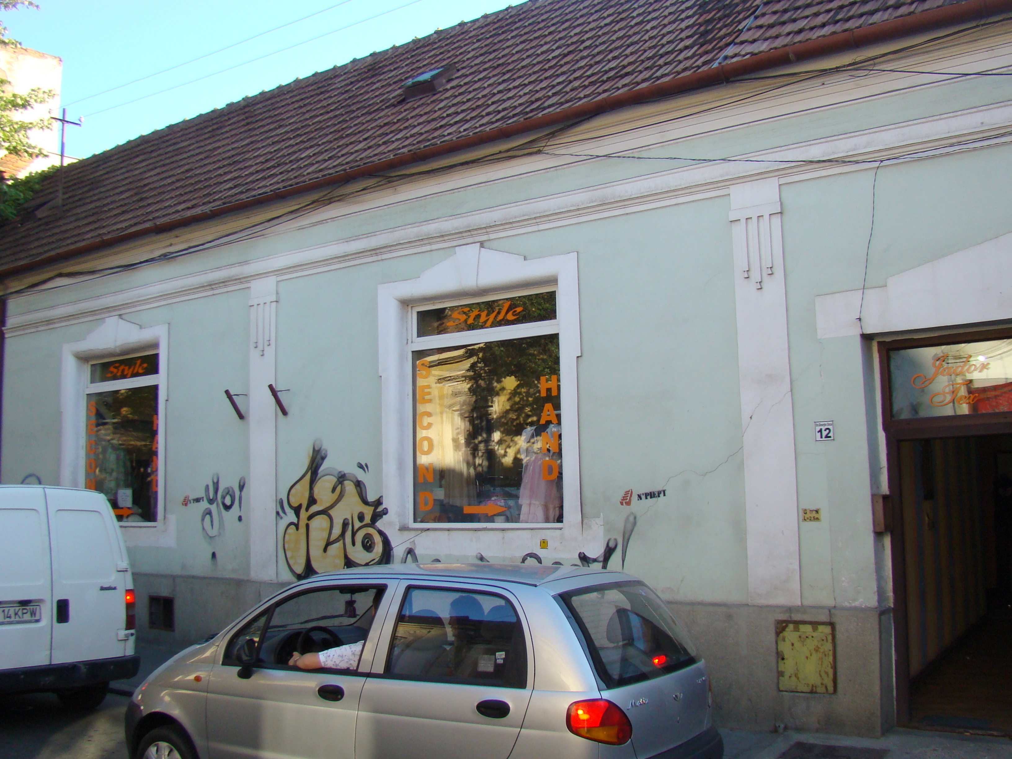 Sediul mișcării de rezistență antihorthistă